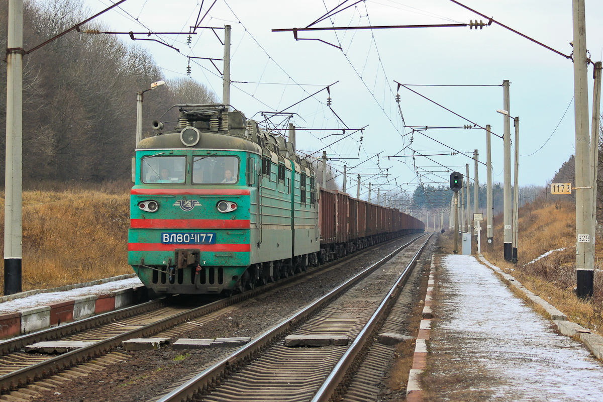 З.п. Нова Гута